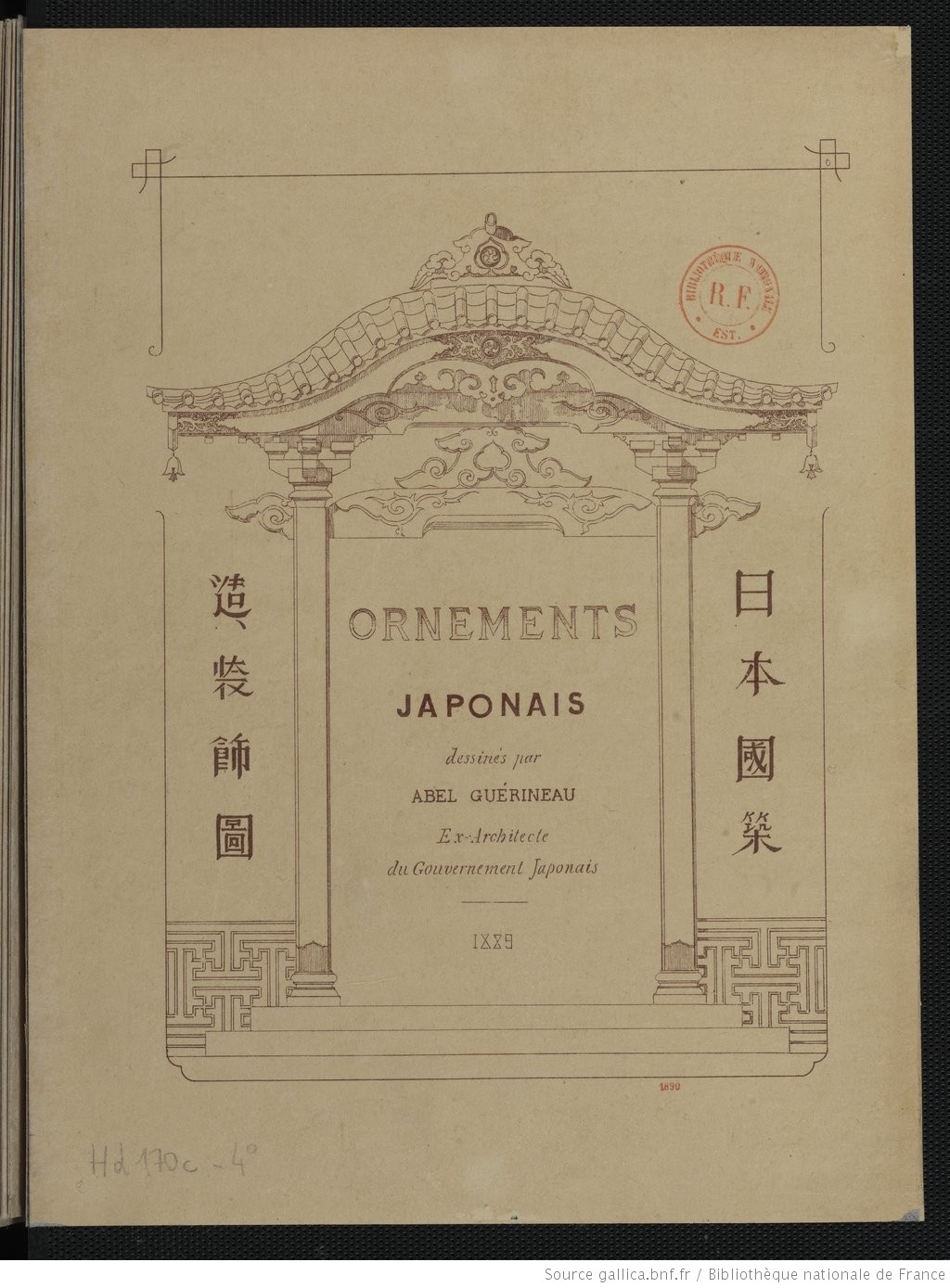 日本國築造、裝飾圖